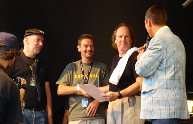 Übergabe der Ehrenmitgliedschaft in der Arf Society e. V an Adrian Belew auf der Zappanale 2006